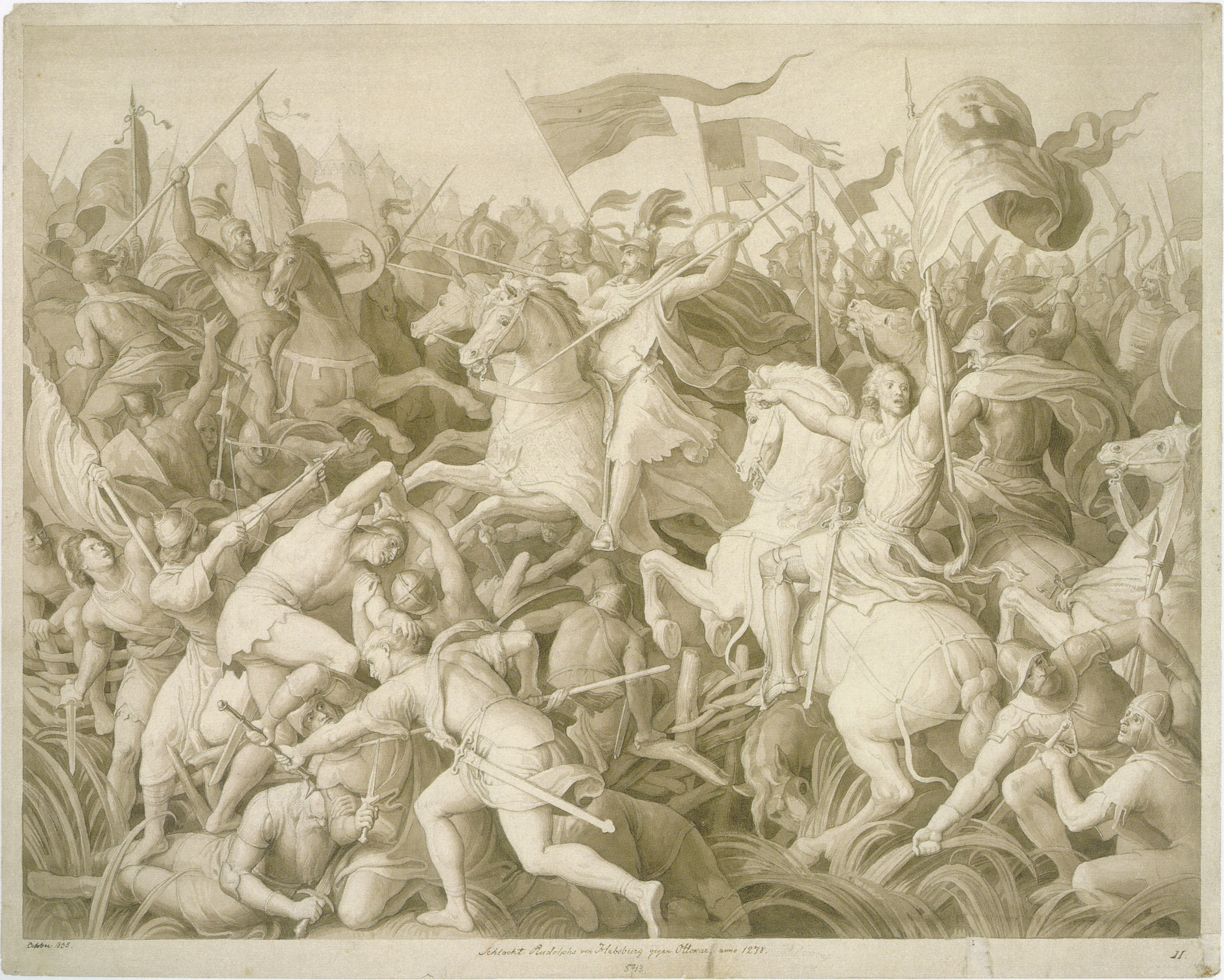 Die Schlacht Rudolfs von Habsburg gegen Ottokar von Böhmen anno 1278, 1835